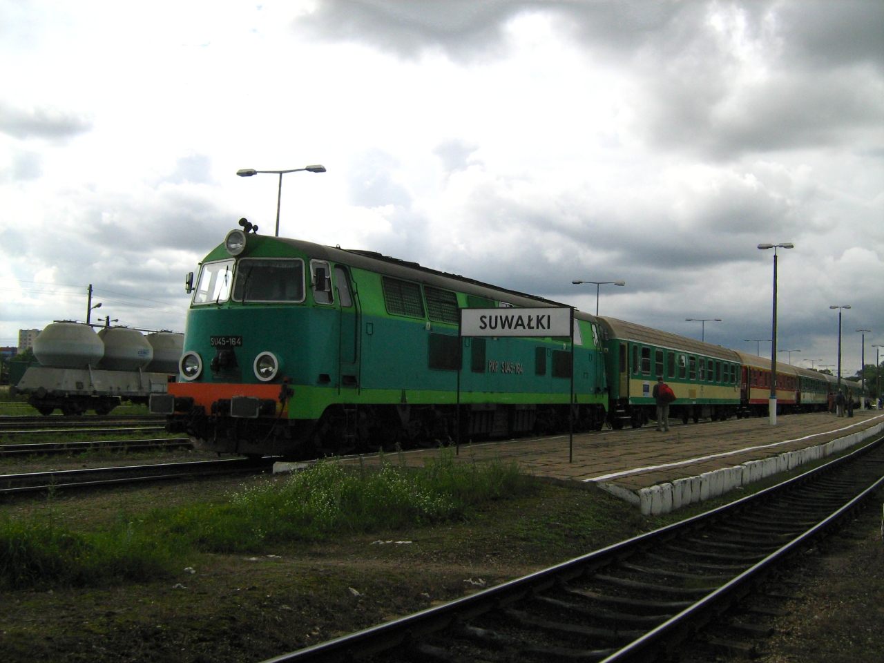 SU45-164 with a train to Warszawa Zachodnia, about to depart from Suwałki